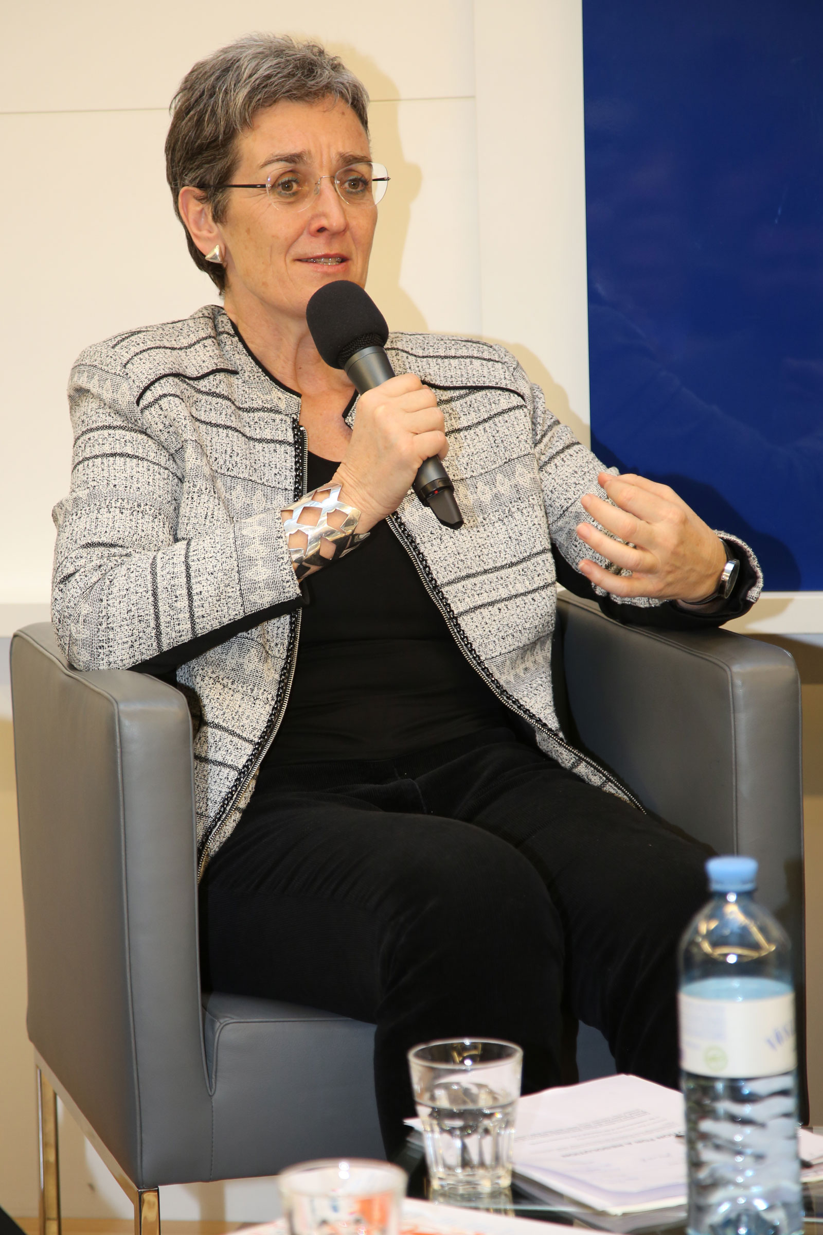 Lunacek.Ulrike-6701